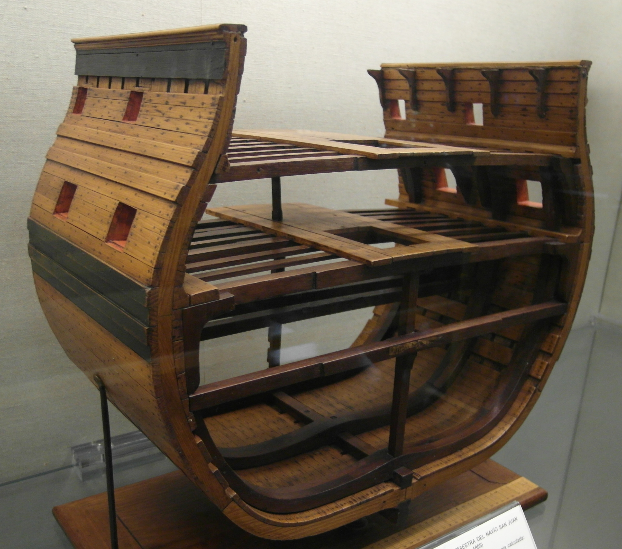 Sección de la cuaderna maestra del San Juán Nepomuceno (1766-1805), modelo realizado en el siglo XVIII para comparar los sistemas de construcción inglés y francés.